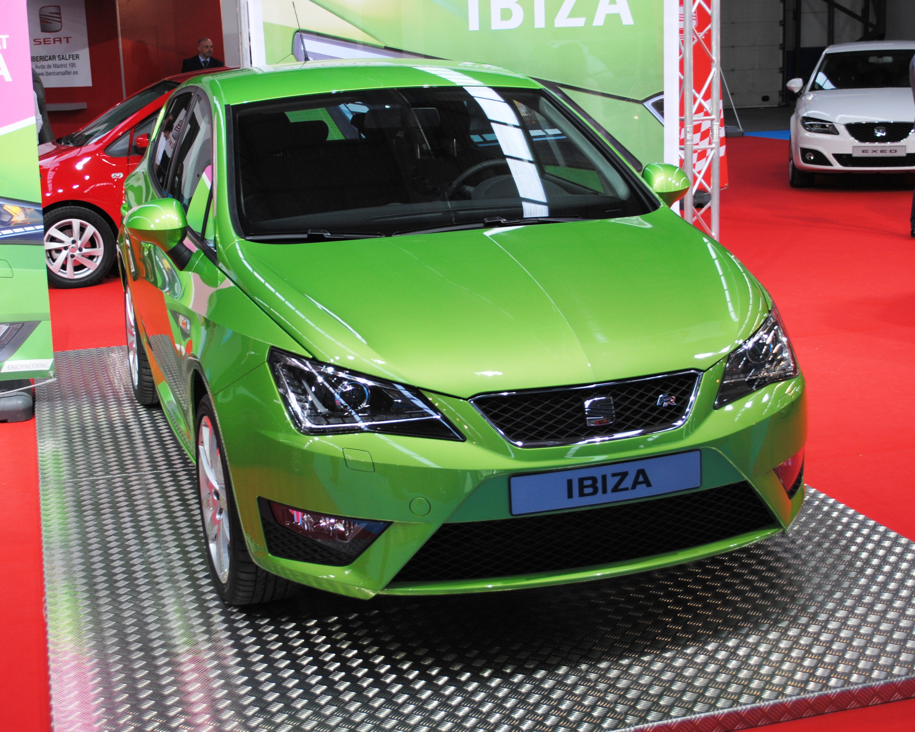 SEAT IBIZA FR facelift, 2012, IFEVI